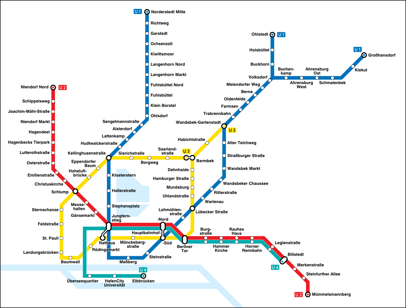 Netzkarte der U-Bahn Hamburg.